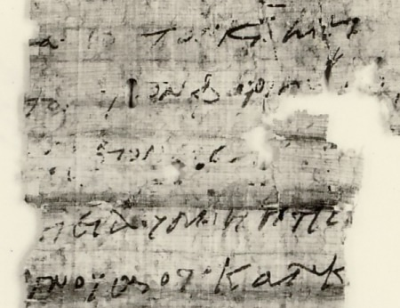 Papyrus 3 (GA) Luc 7:36,37